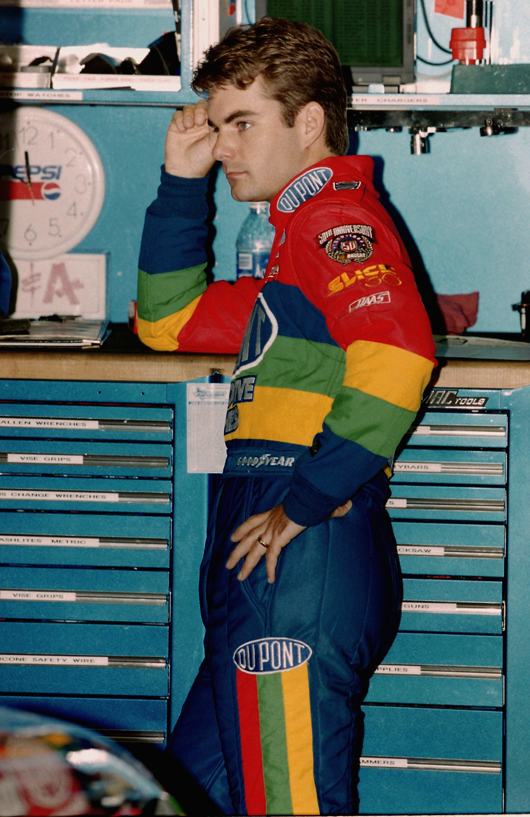 Jeff Gordon in 1998